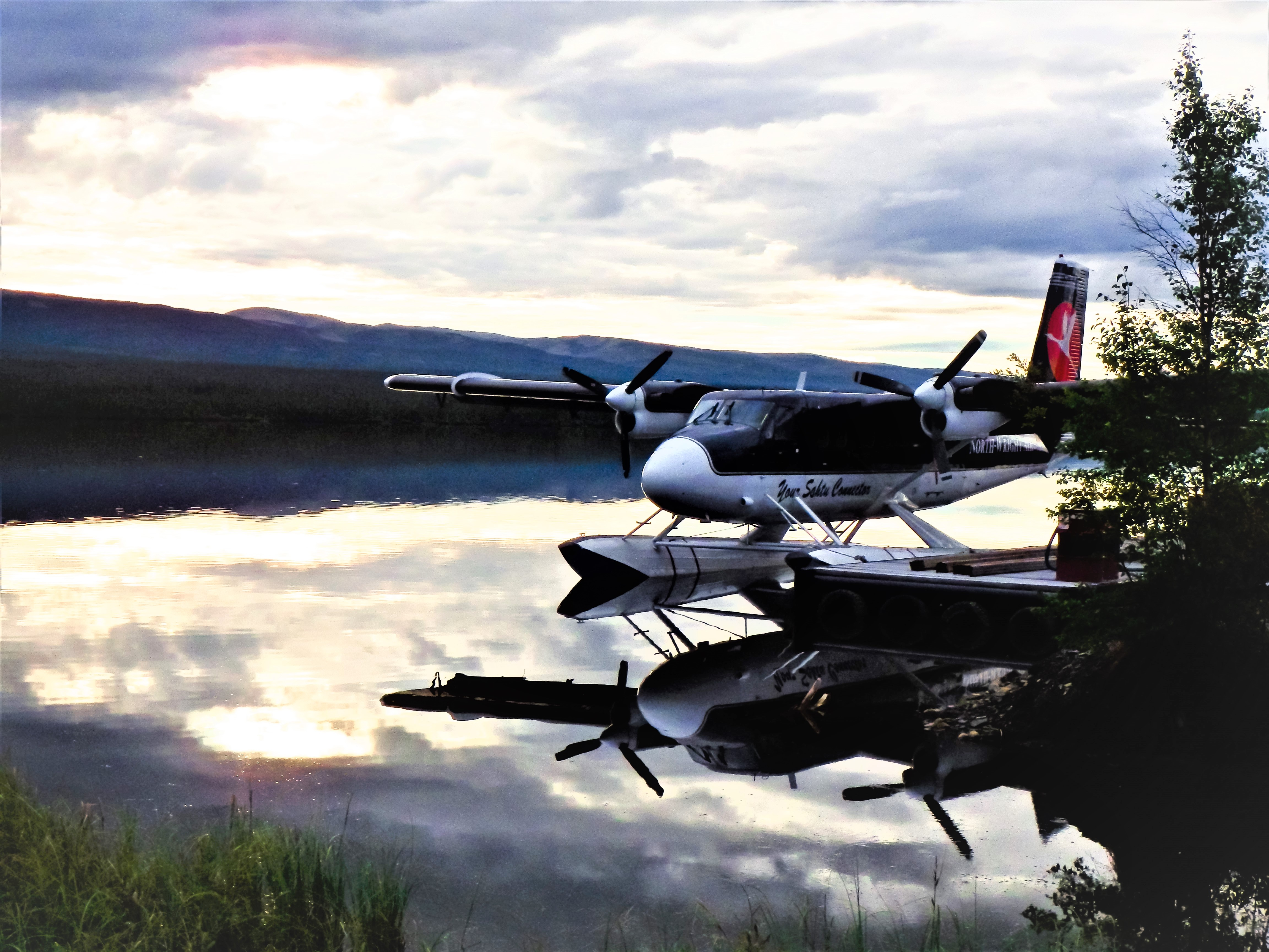 Twin Otter